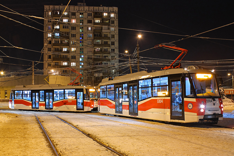 Московский трамвай в Новогиреево. Фото снято в декабре 2010 года в Новогиреево, Москва